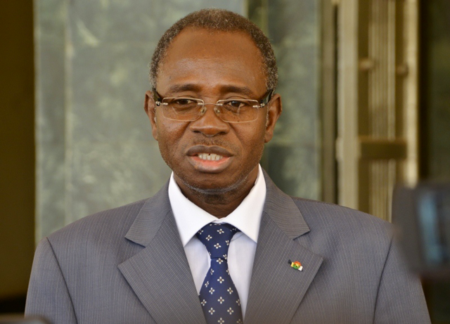 Clément Sawadogo au Ministère de la Sécurité